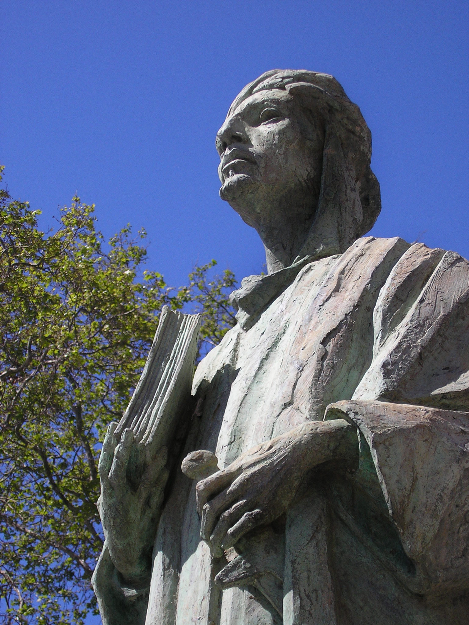 Estatua de Almanzor en Algeciras, Andalucía, España